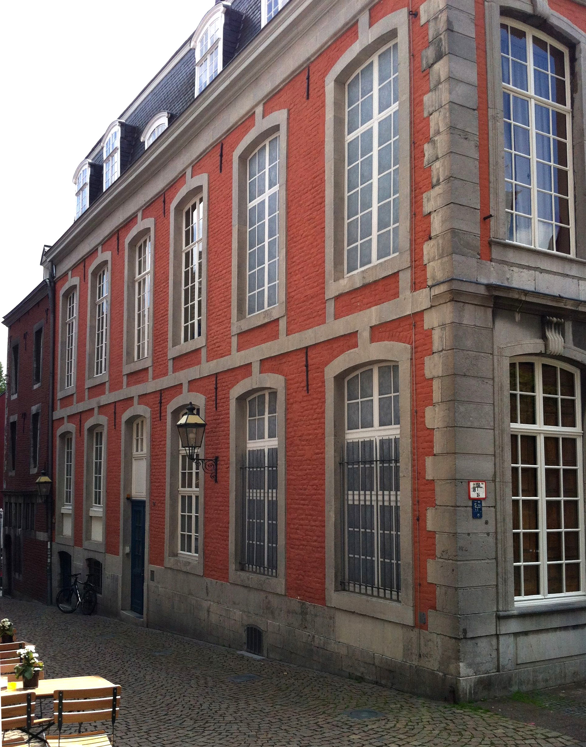 Haus Monheim und Haus zum Lindenbaum (links im Hintergrund), heute Couven-Museum von der Rommelsgasse aus gesehen